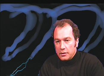 Portrait de Costis